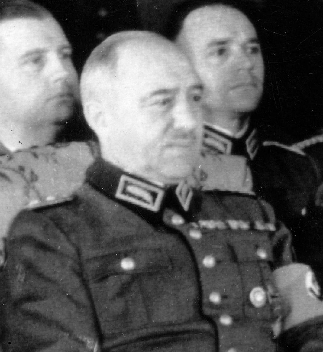 Konstantin Hierl